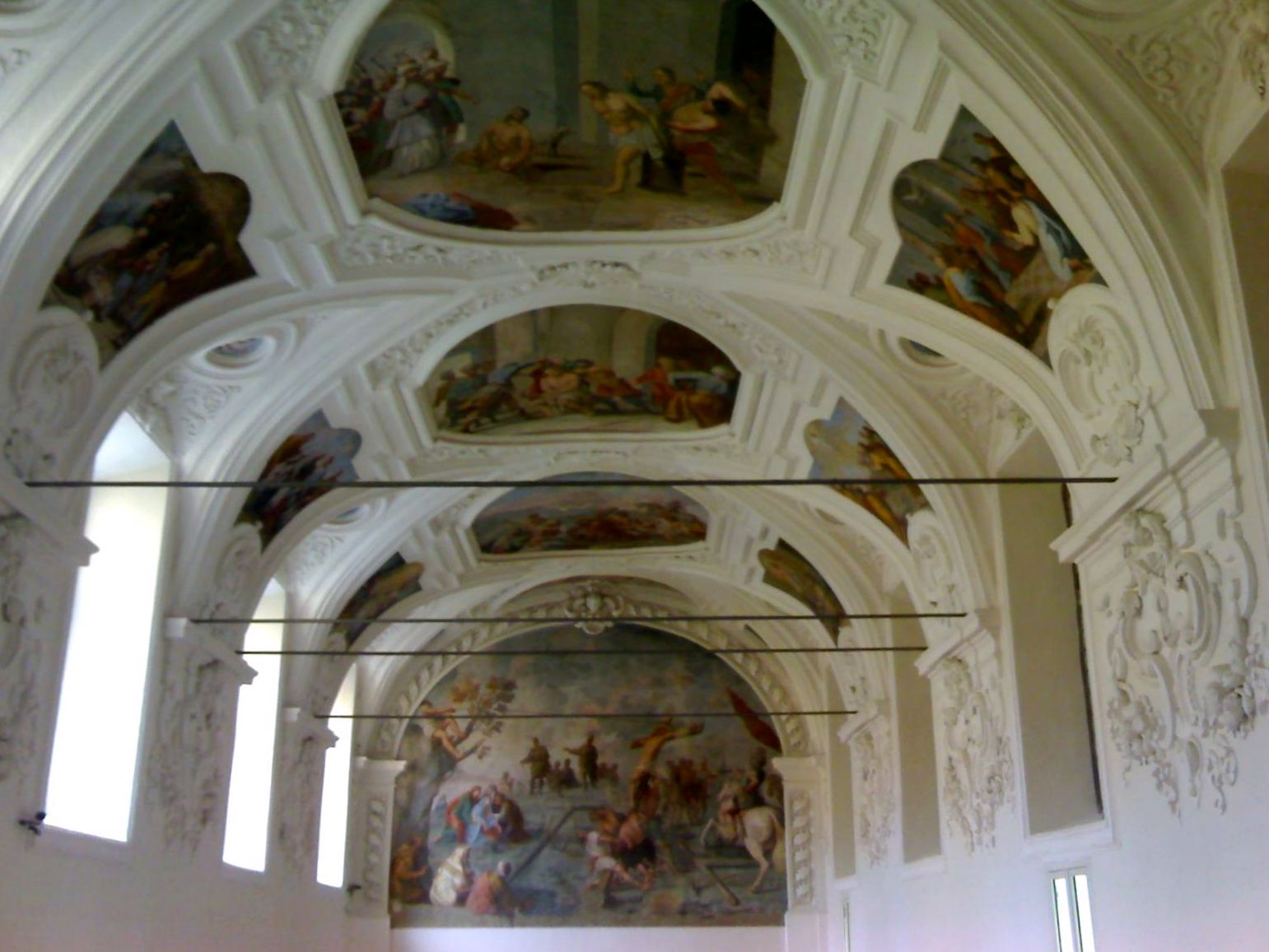 Convento di san Domenico Maggiore di Napoli - La sala del Capitolo